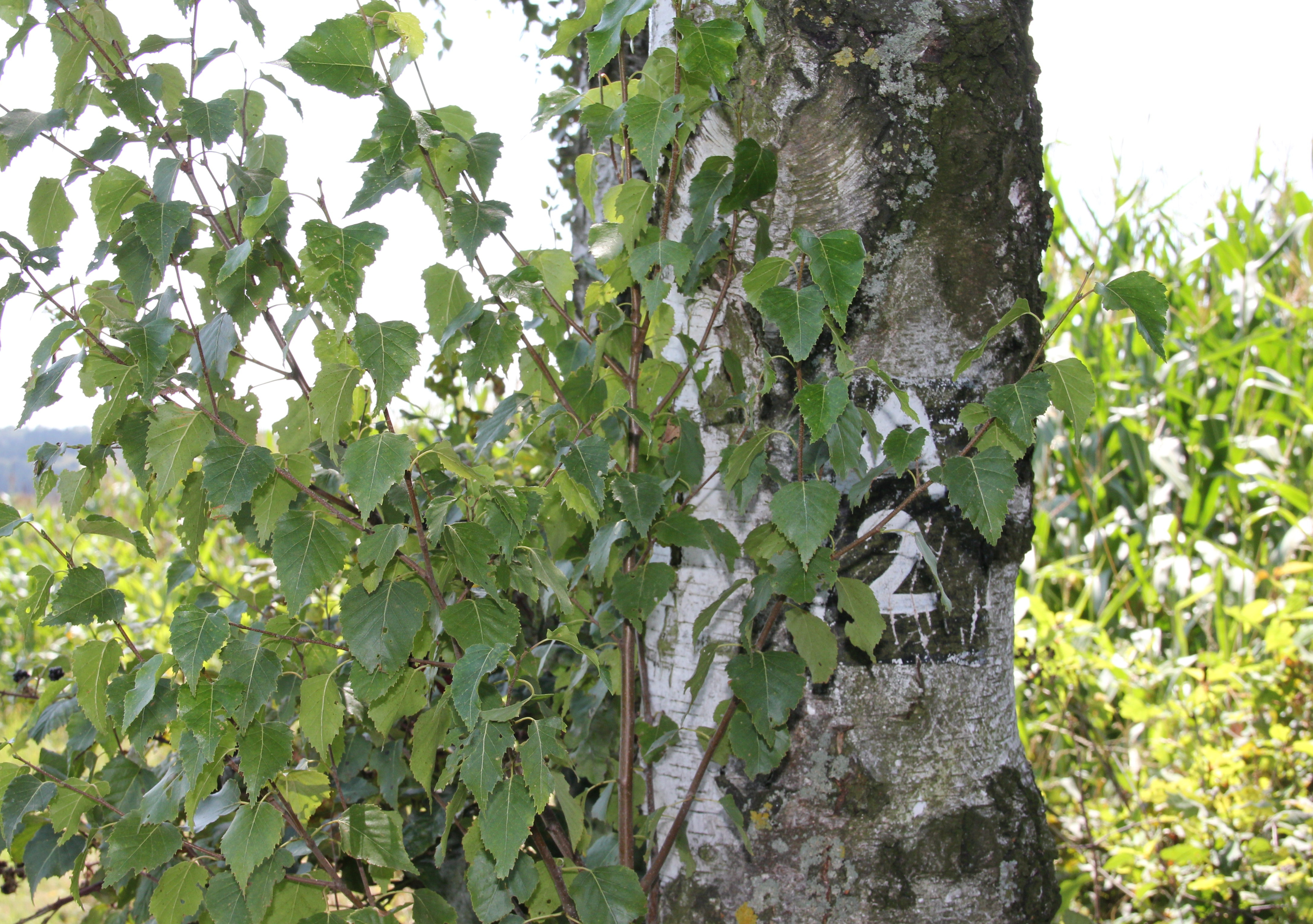 Markierung des Rundwanderweges A2 des Sauerländischer Gebirgsverein - Bezirk Bergisches Land e. V. (SGV) an einer Birke auf dem Weg von Höffen ins Naafbachtal